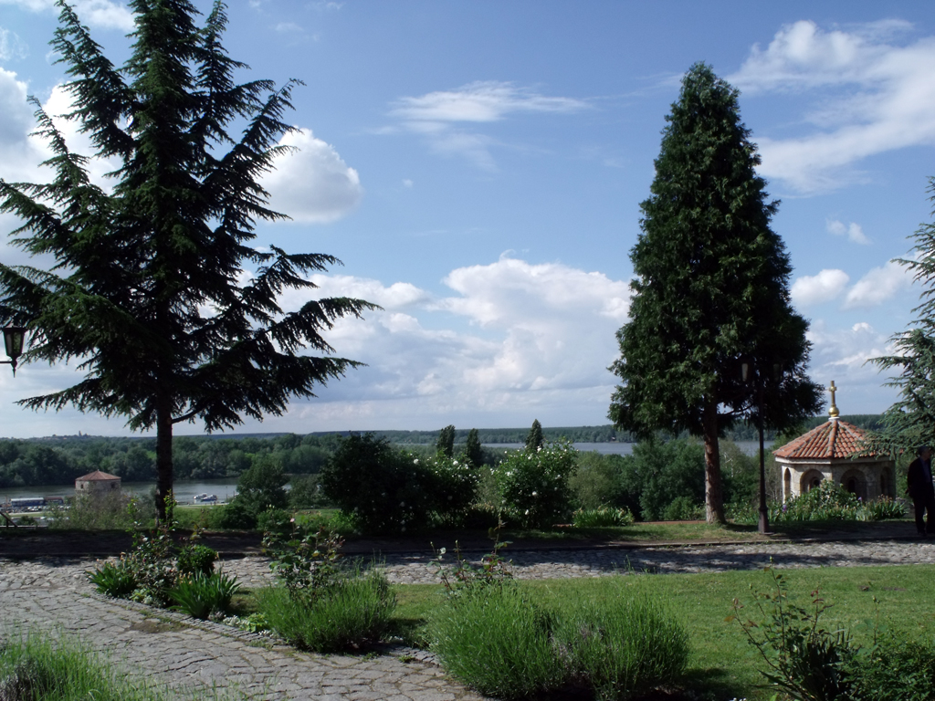 Kalemegdan (Калемегдан) ist eine Parkanlage auf dem ehemaligen Glacis der Festung von Belgrad in der serbischen Hauptstadt Belgrad. Der Kalemegdan teilt sich in die Anlagen des großen und kleinen Kalemegdans. Der Kalemegdan befindet sich nordwestlich des heutigen Stadtzentrums von Belgrad oberhalb der Mündung der Save in die Donau. Von hier aus bietet sich ein weiter Blick auf den Mündungsbereich mit der Großen Kriegsinsel (heute Naturschutzgebiet) sowie auf die Belgrader Stadtteile Zemun und Novi Beograd, darüber hinaus Richtung Norden auf die große bewaldete und von Kanälen durchzogene Fläche der Pannonischen Tiefebene. Quelle: wikipedia.de